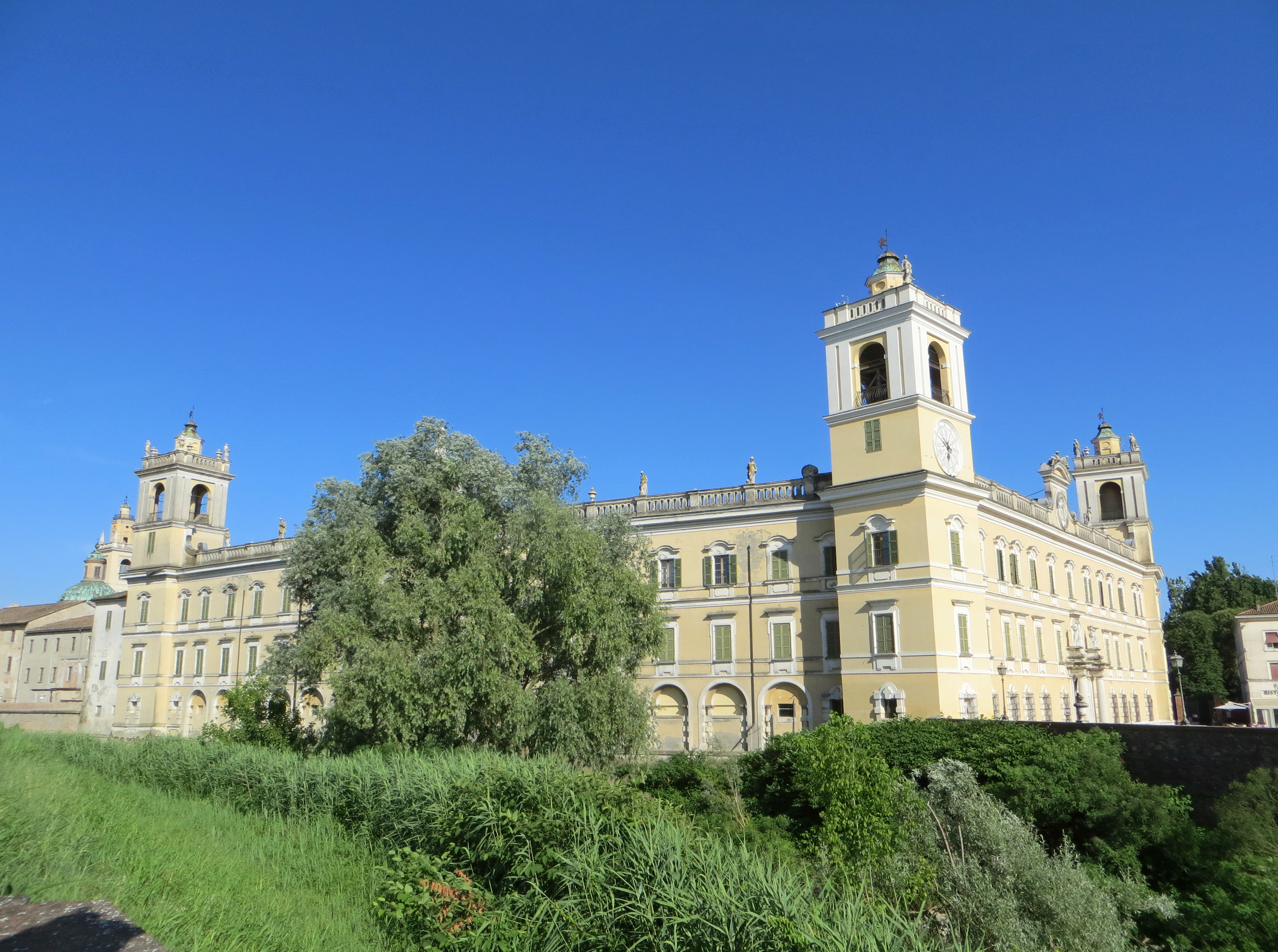 Palazzo Ducale (Colorno) - facciata e lato nord-ovest This is a photo of a monument which is part of cultural heritage of Italy.